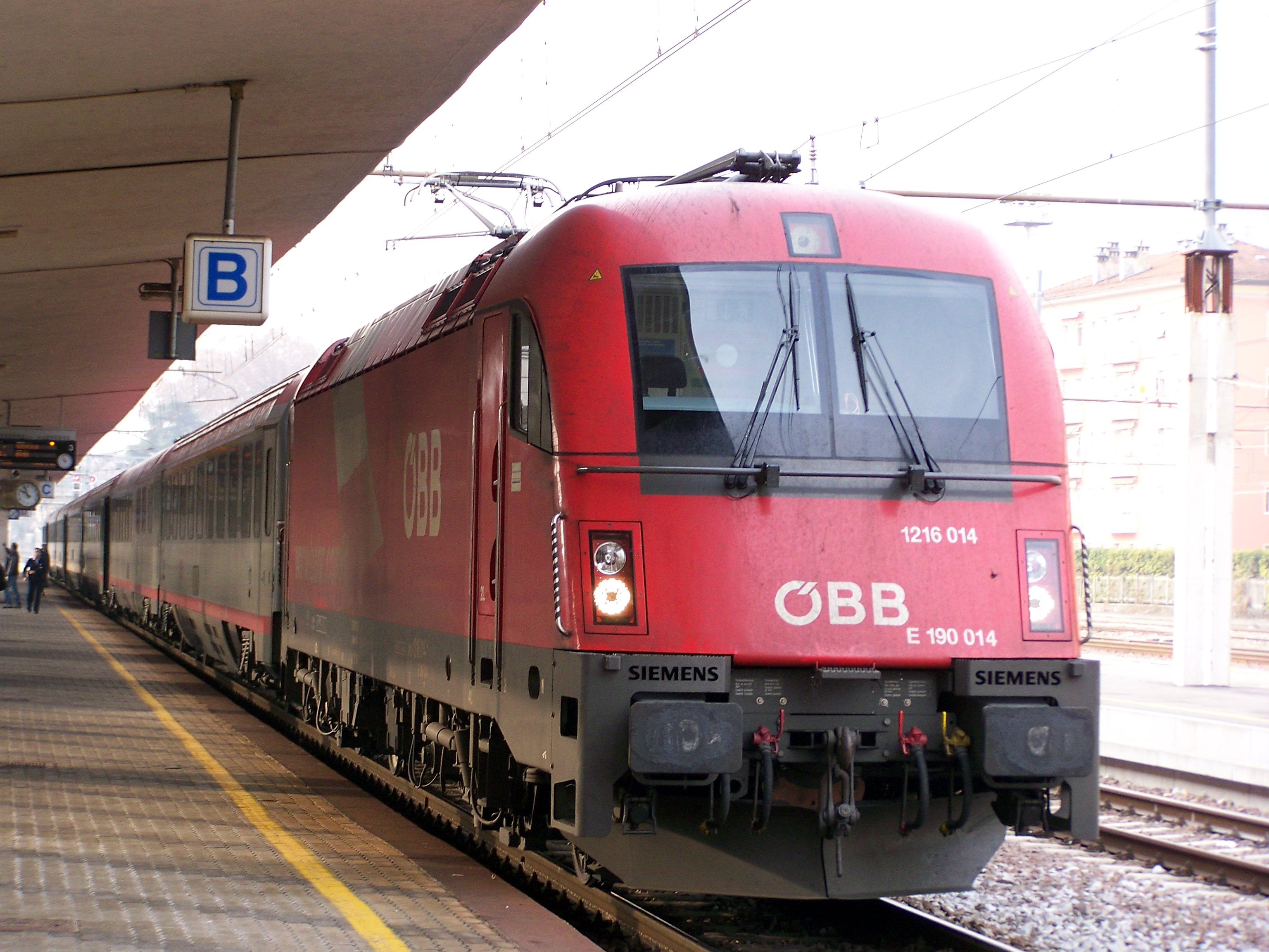 L'Eurocity 88 OBB-DB-LeNord Milano Porta Garibaldi - Munchen Hbf in sosta al binario 3 della stazione di Trento. In testa al convoglio la ÖBB 1216.114, E.190 in Italia. Al traino una carrozza ristorante "è-express" e sei carrozze passeggeri ÖBB.